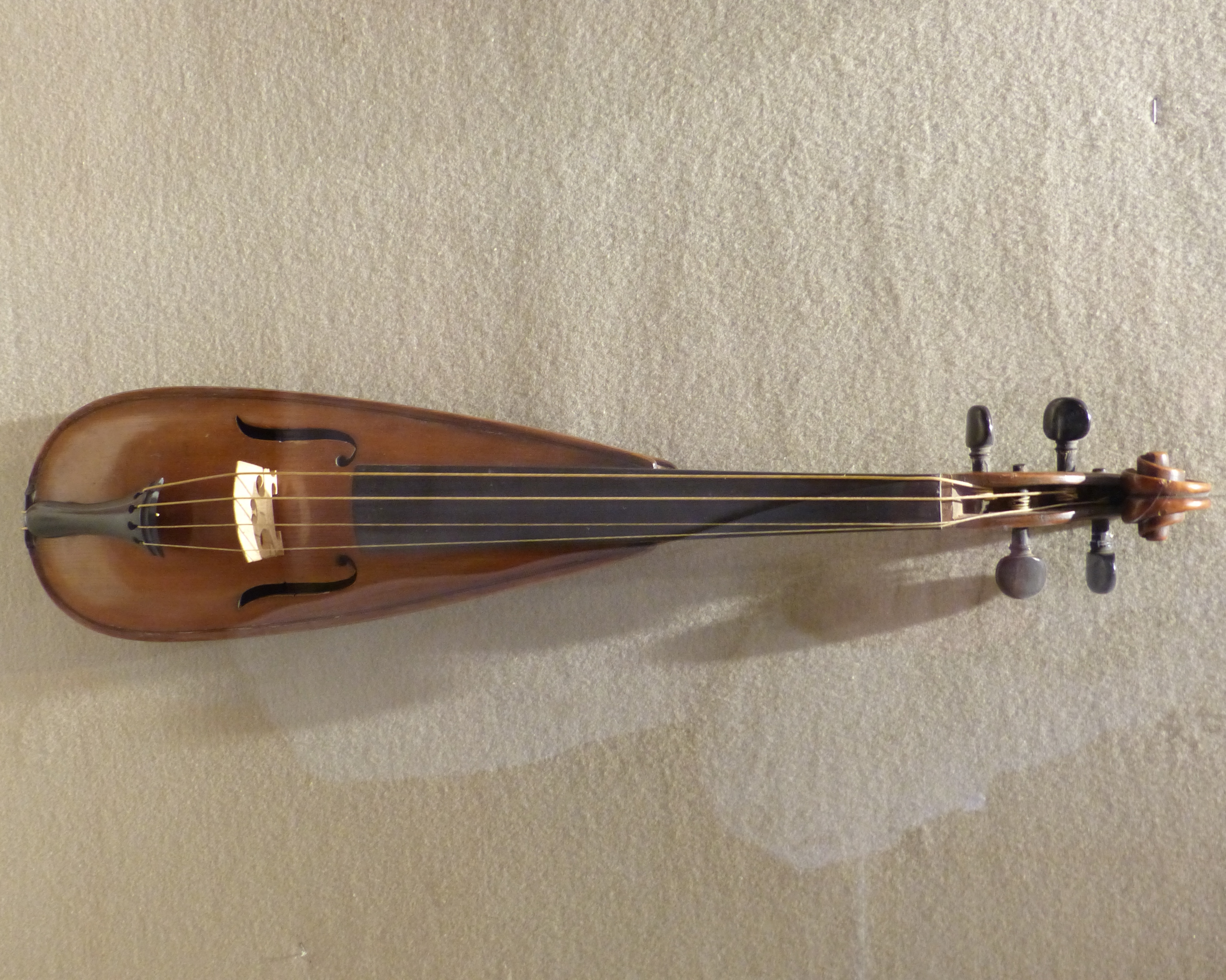 Nice (Alpes-Maritimes, France), au cœur du Vieux Nice, le palais Lascaris avec, entre autres, sa fabuleuse collection d'instruments de musique anciens, la deuxième de France.